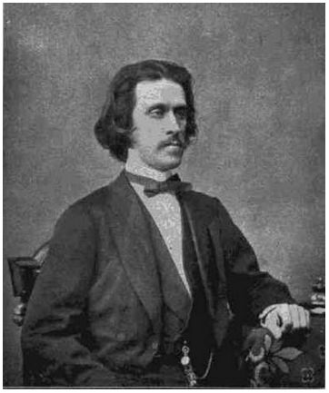 Давид Ааронович Черномордиков (1869—1947) — российский композитор, пианист, писатель и музыкальный критик; один из авторов «Еврейской энциклопедии Брокгауза и Ефрона».